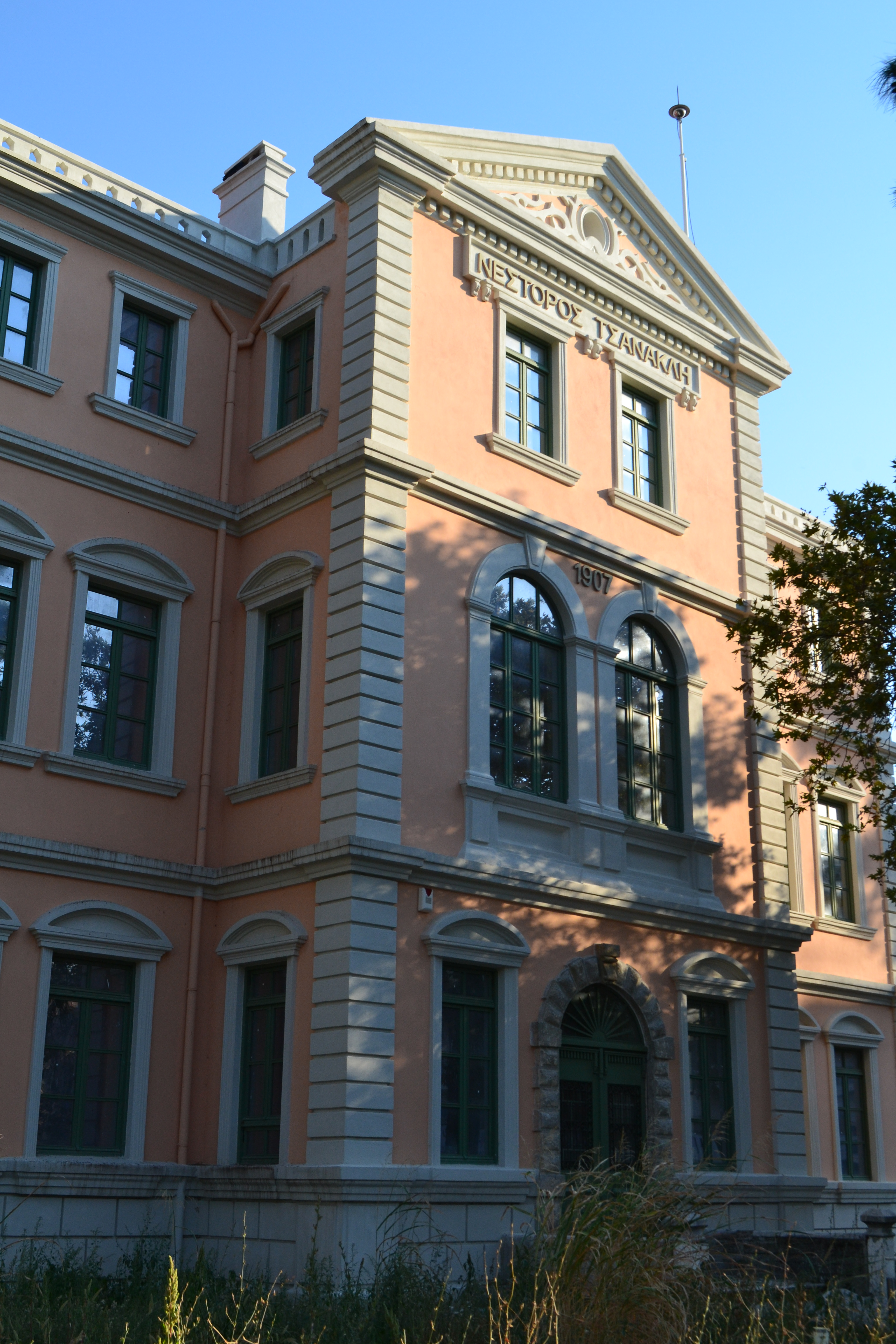 Τσανάκλειος Σχολή«Τσανάκλειος Σχολή»